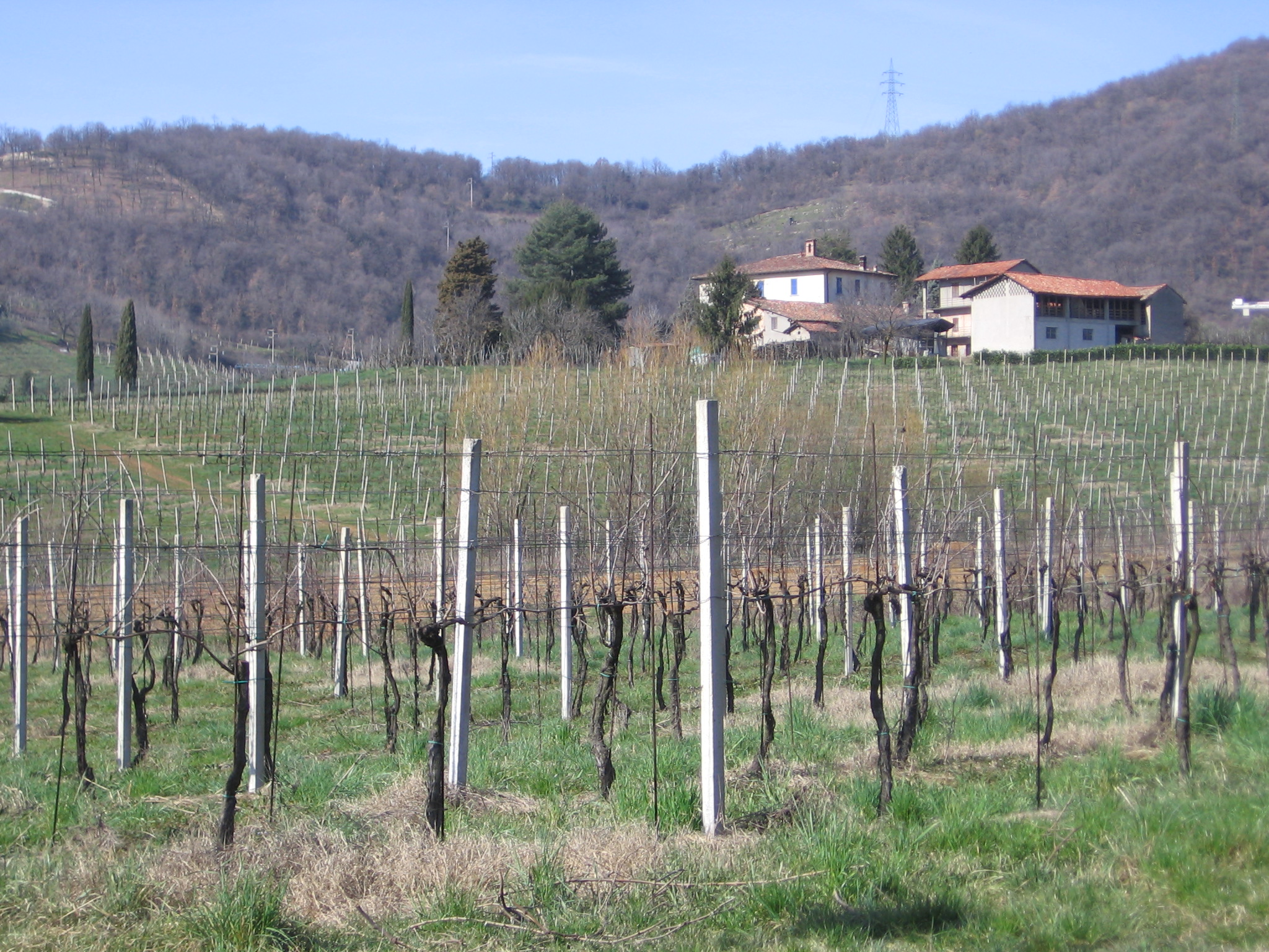 Vigneti, Scanzorosciate, Bergamo, Italy